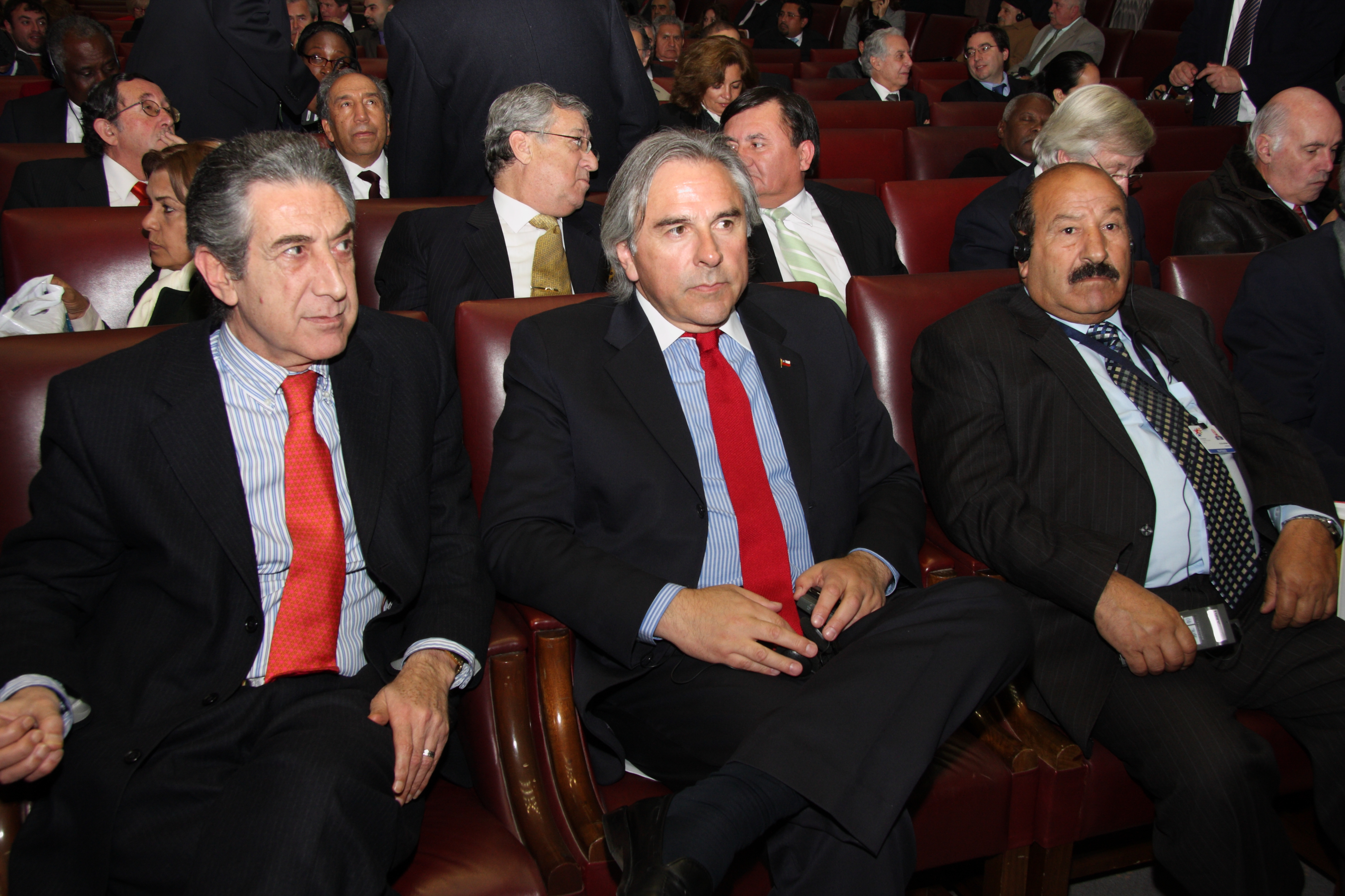 De izquierda a derecha, los diputados Jorge Tarud e Iván Moreira.